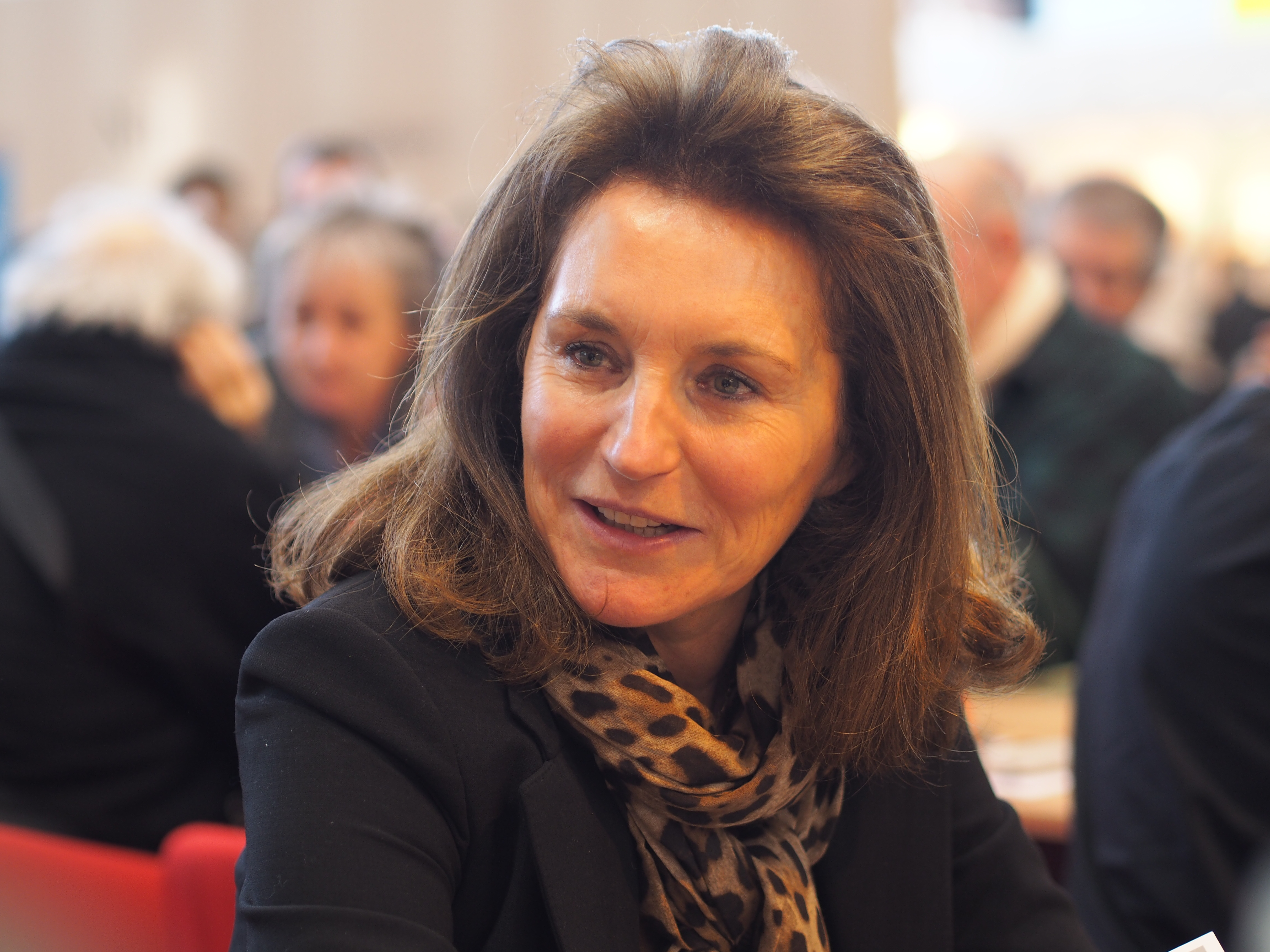 Cécilia Attias au Salon du livre de Paris, le dimanche 23 mars 2014.